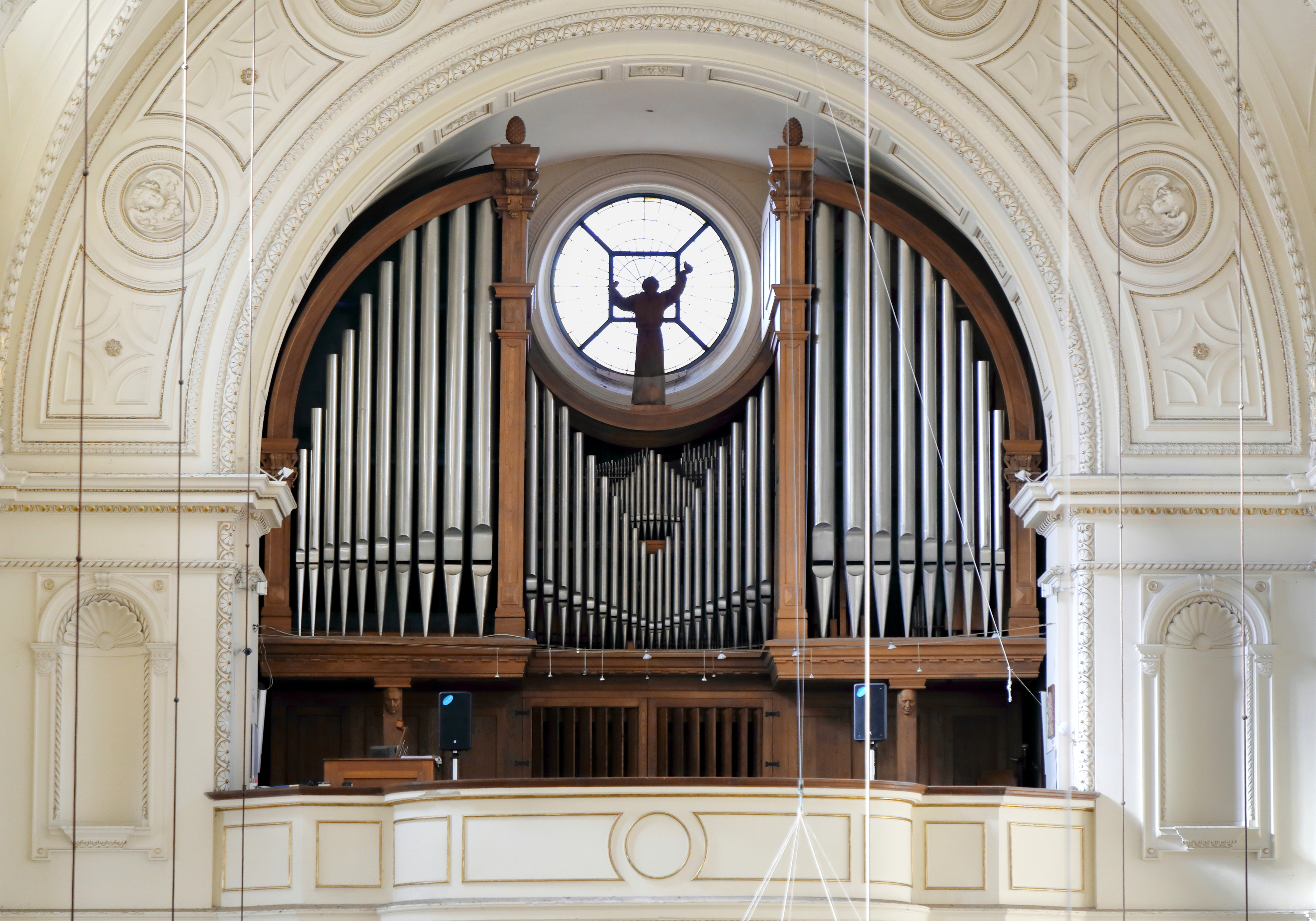 Hauptorgel der Pfarrkirche „Zum hl. Franziskus Seraphikus“ in Breitenfeld, ein Bezirksteil des 8. Wiener Gemeindebezirkes Josefstadt. Sie ist die zweitgrößte spielbare Orgel Wiens (nach der Stephansdomorgel).Die Orgel wurde ursprünglich 1931 von Rieger-Orgelbau für den Innsbrucker Dom in dem historischen Gehäuse von Johann Caspar Humpel (1725) errichtet. Nachdem Innsbruck eine neue Orgel von der Orgelbauwerkstatt Pirchner bekam, wurde die alte Orgel nach Breitenfeld übertragen. Dabei hat ab 1999 der Orgelbauer Peter Maria Kraus (Lungauer Orgelbauwerkstatt) die Orgel nach neuem Konzept gänzlich überarbeitet und in einem neuen Gehäuse, für das rd. 12 m³ Eichenholz benötigt wurden, eingebaut. 2001 erfolgte die feierliche Einweihung der Orgel, die rd. 5000 Pfeifen und 56 Registern auf drei Manualen und Pedal hat. Im Jahr 2010 erhielt die Pfarrkirche noch eine Chororgel mit 13 Register, die sowohl vom 4. Manual des Hauptspieltisches auf der Orgelempore, als auch von einem eigenen Spieltisch, der beim Ambo steht, bespielt werden kann.